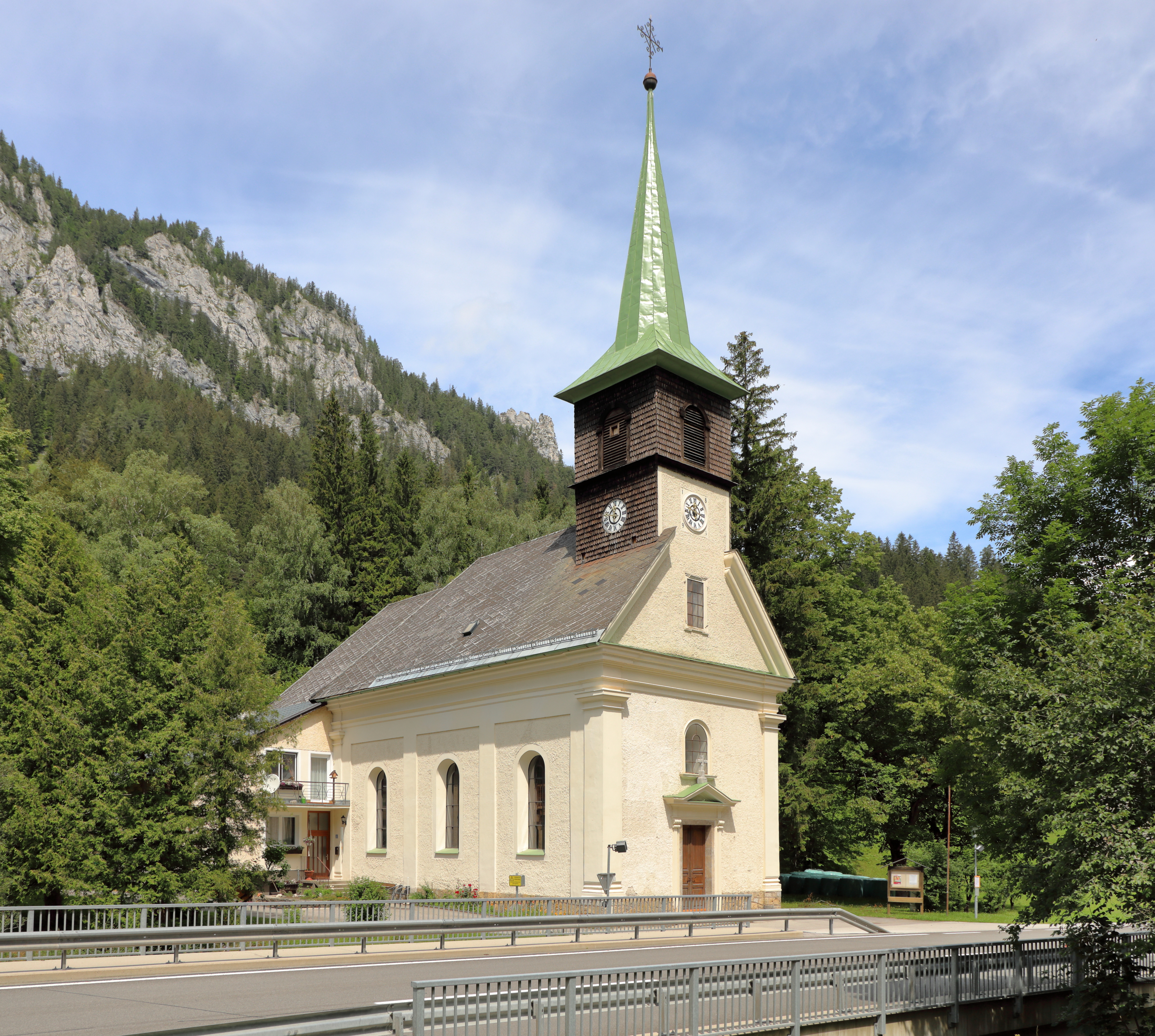 Südostansicht der röm.-kath. Kirche Mariä Heimsuchung in Wegscheid, ein Ortsteil der steiermärkischen Gemeinde Mariazell.Ursprünglich 1710 aus Holz errichtet; nachdem die Kirche am 11. Februar 1894 abbrannte, wurde sie in gemauerter Form neu errichtet und am 28. September 1895 durch den Bischof von Seckau, Leopold IV. Schuster, geweiht.